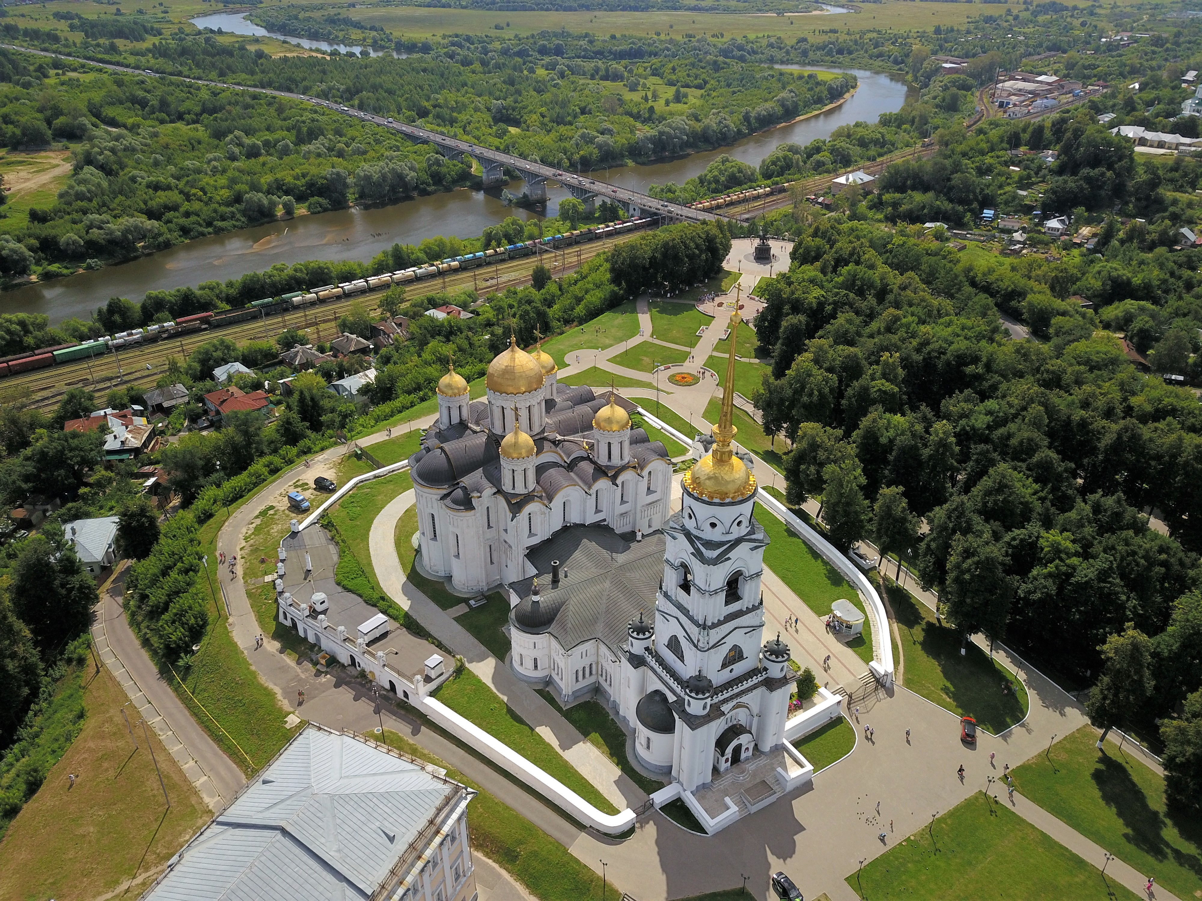 Ансамбль Успенского собора: улица Большая Московская, 56, Владимир, Владимирская область